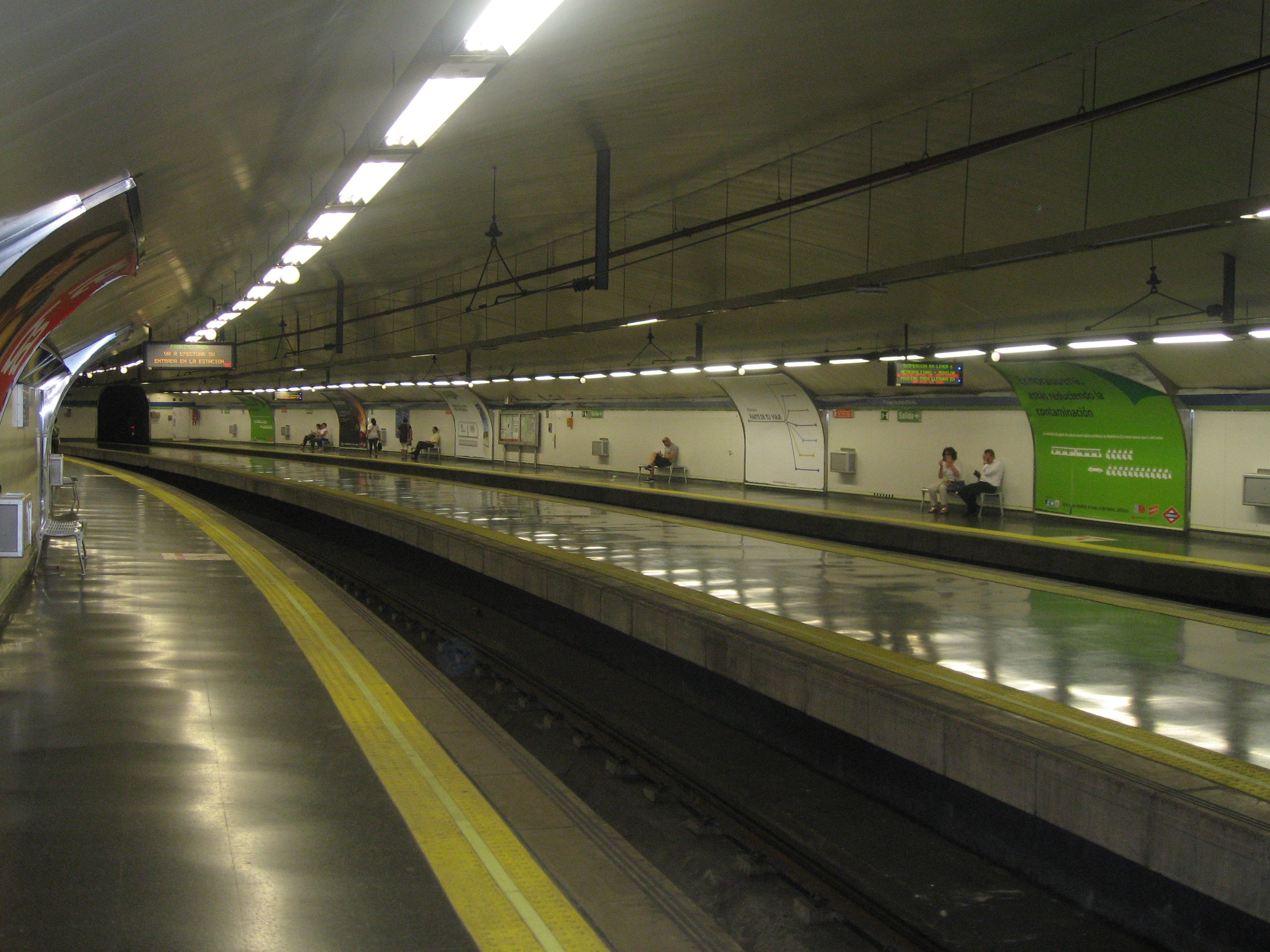 Vista de los andenes de la estación de Carabanchel